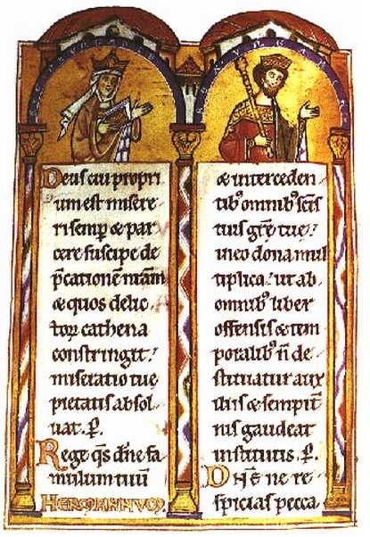 Landgrafenpsalter